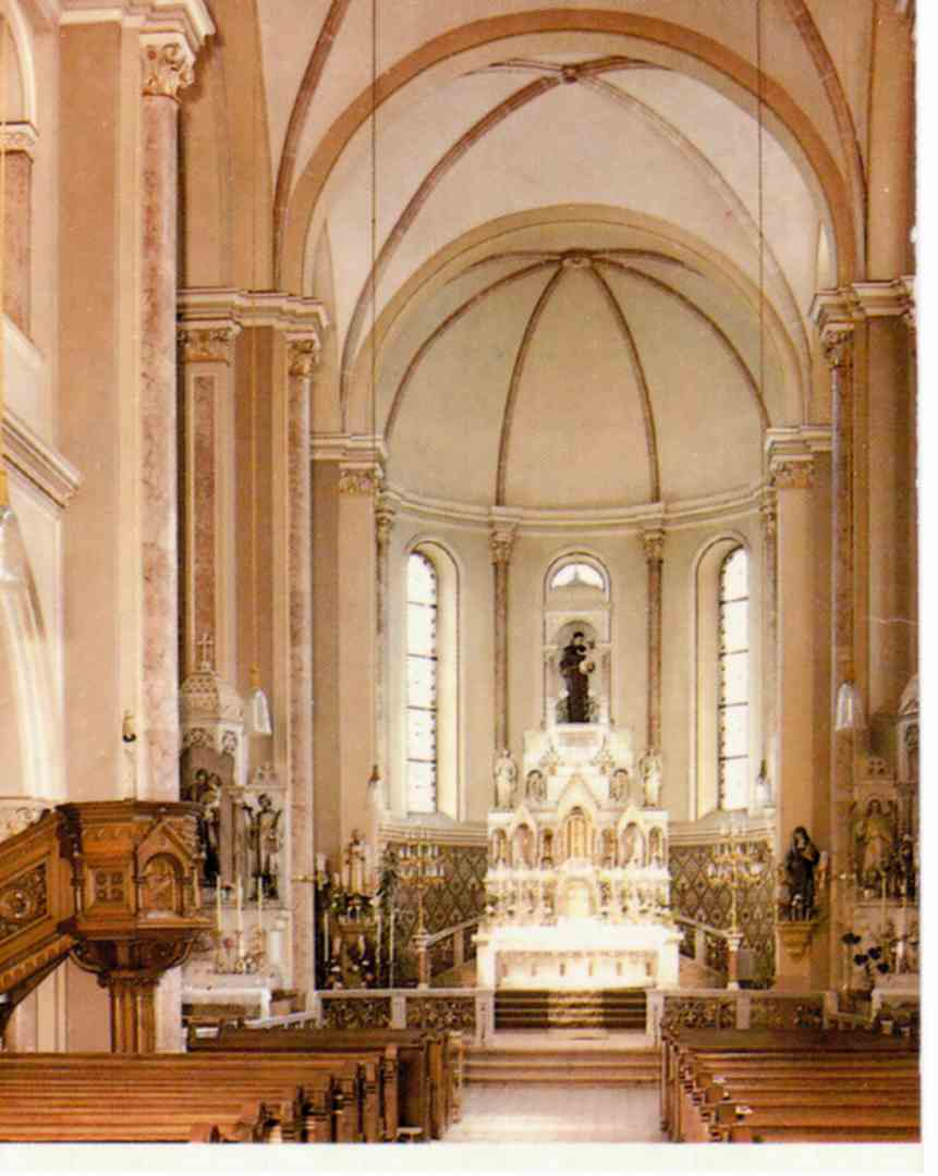 Innenansicht der Pfarrkirche St. Anton v. Padua Wien XV.